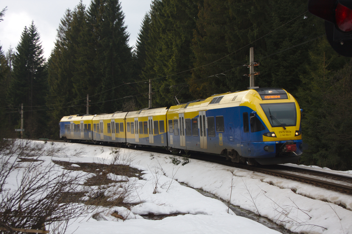 Elektryczny zespół trakcyjny EN75-003 "Flirt" jako przyspieszony pociąg Kolei Śląskich "Turysta" mija przejazd kolejowy w przysiółku Ligockowie w Lalikach. Szlak Zwardoń-Sól.